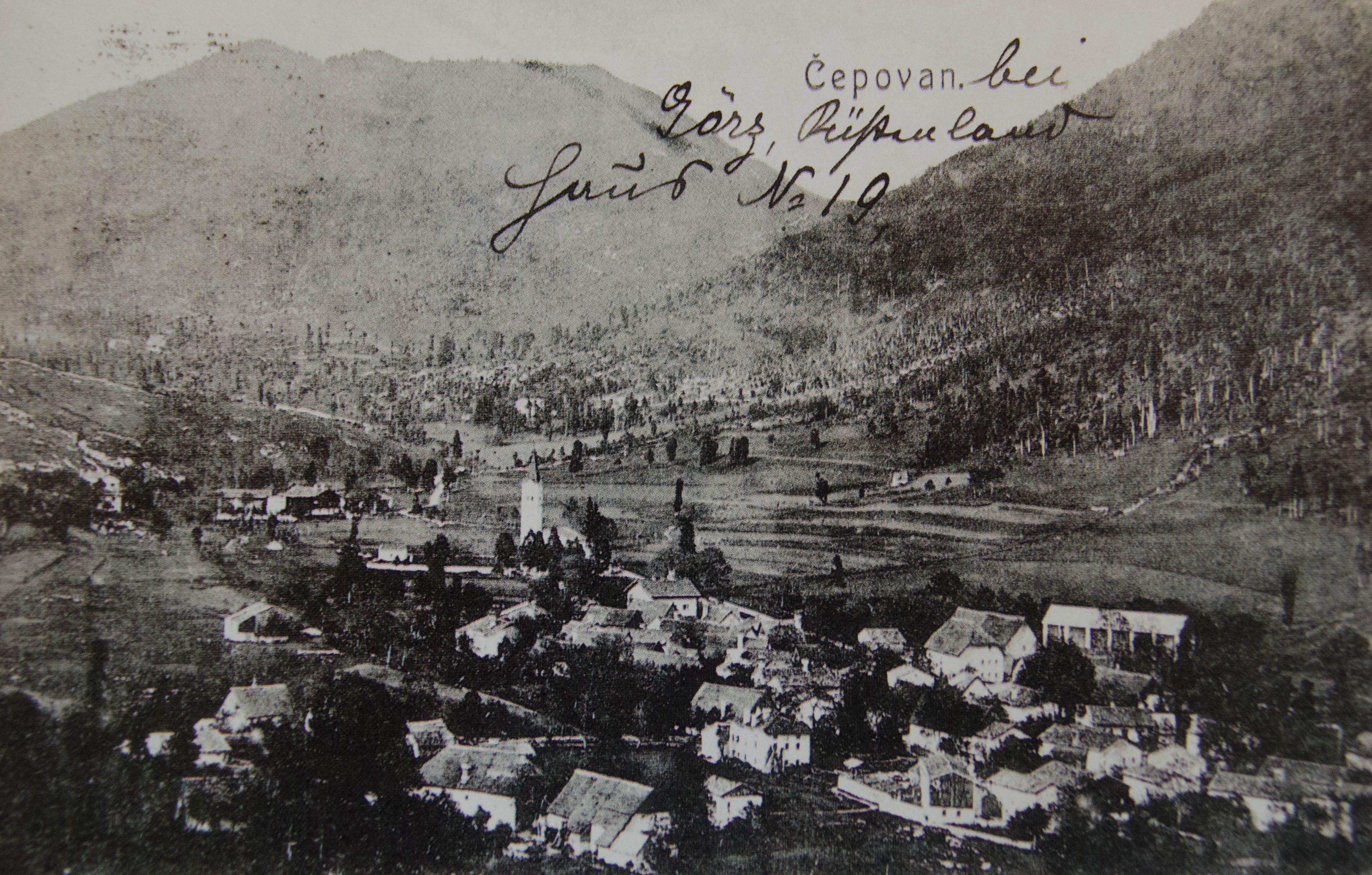 Razglednica Čepovana.